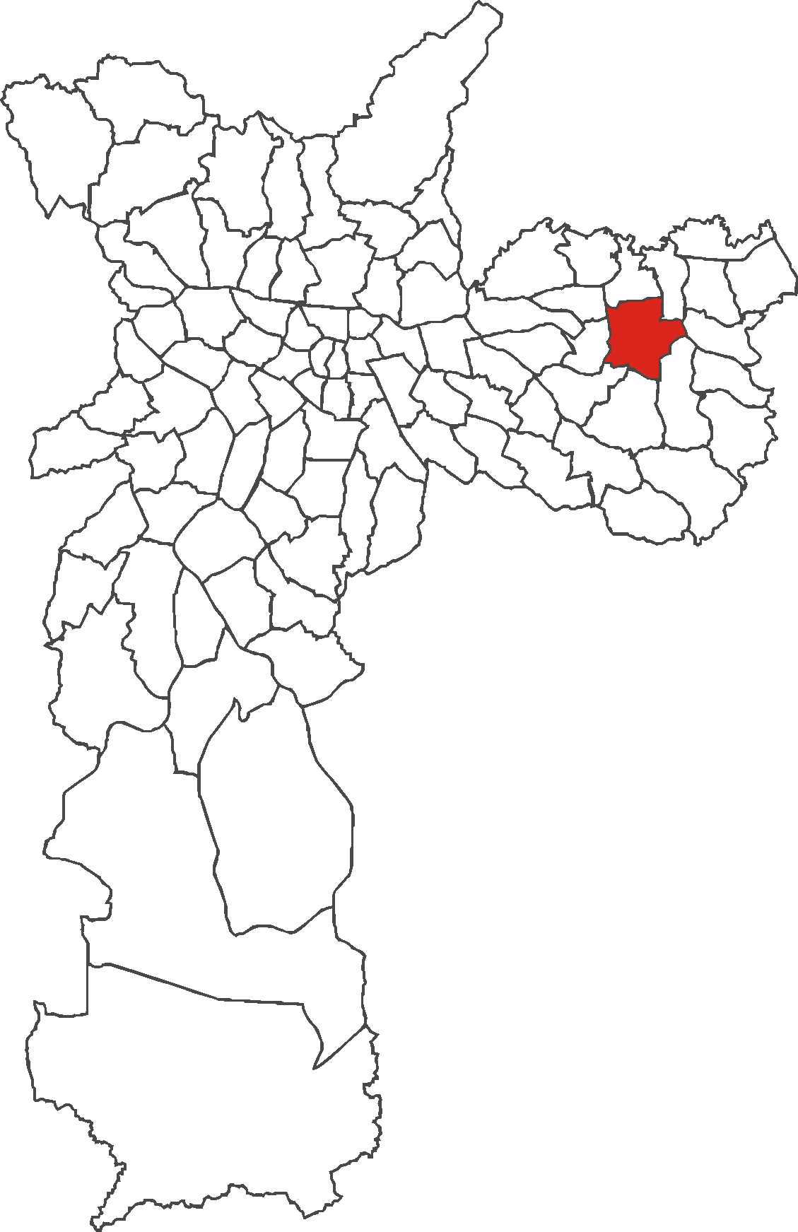 Localização do distrito de Itaquera no município de São Paulo.